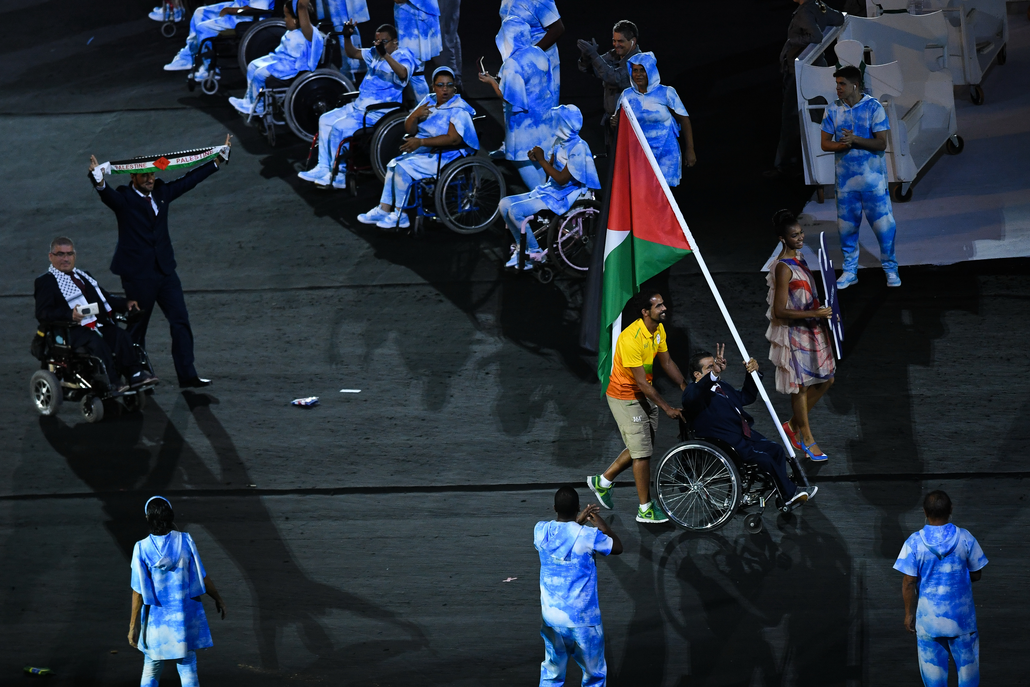 Rio de Janeiro - Cerimônia de abertura dos Jogos Paralmpicos Rio 2016 no Estdio do Maracanã (Tomaz Silva/Agência Brasil)